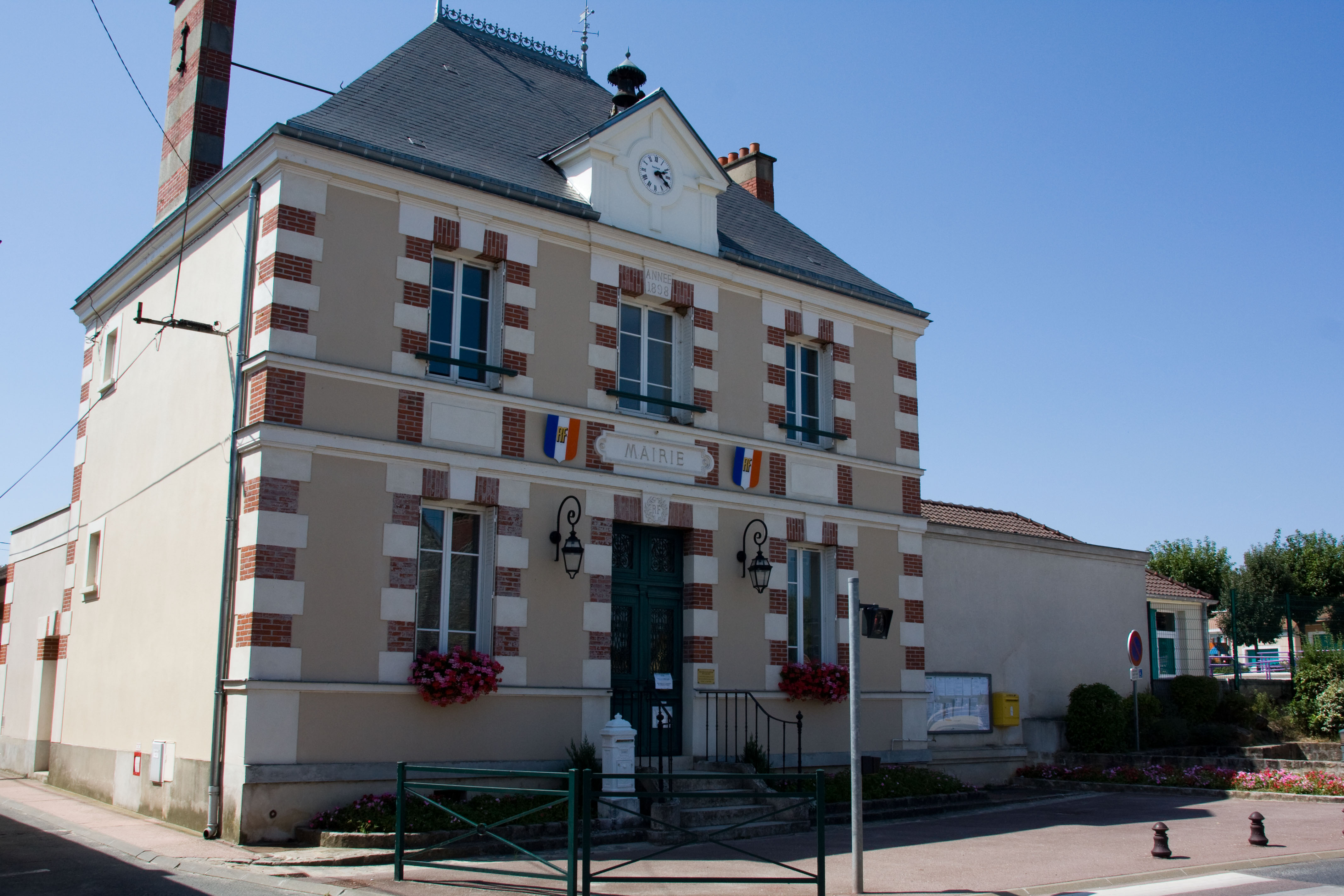 La mairie de Oncy-sur-École, Oncy-sur-École, Essonne, France